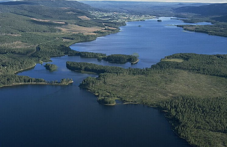 Sundet Motiv: Klövsjö Nyckelord: Flygbilder, Riksintressen Kategori: Insjömiljöer Sundet.